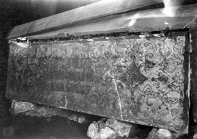 Архангельский собор. Продольная сторона надгробия кн. Дмитрия Ивановича Жилка Углицкого (ок. 1481-1521). Крайнее надгробие во 2-ом ряду у южной стены. Фотография К.А.Фишера. 1905 г. Из коллекций Музея архитектуры им. А.В.Щусева. Инв. номер КПоф 4866-04, 05.